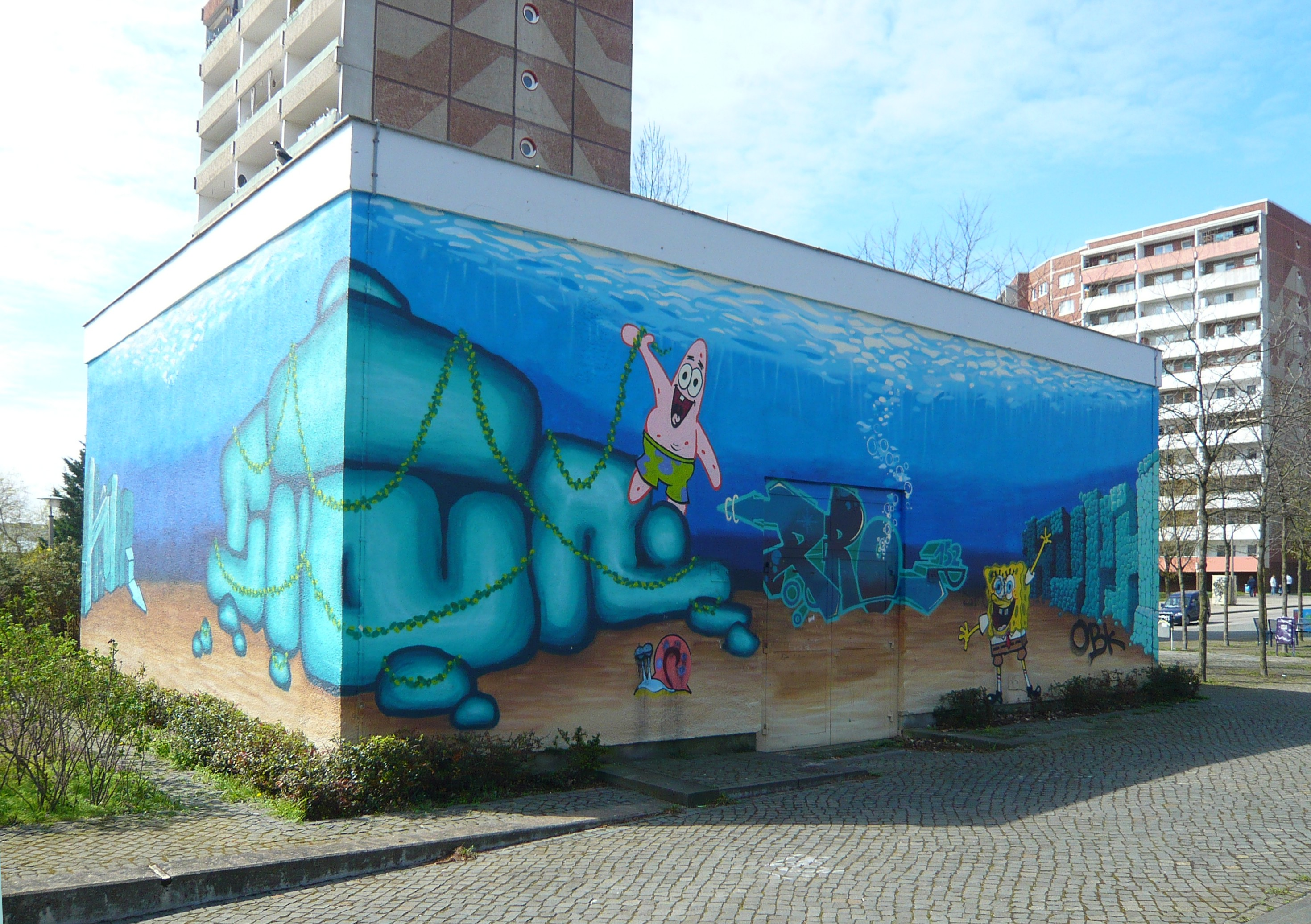 Ortsteil Berlin-Marzahn: Barnimplatz